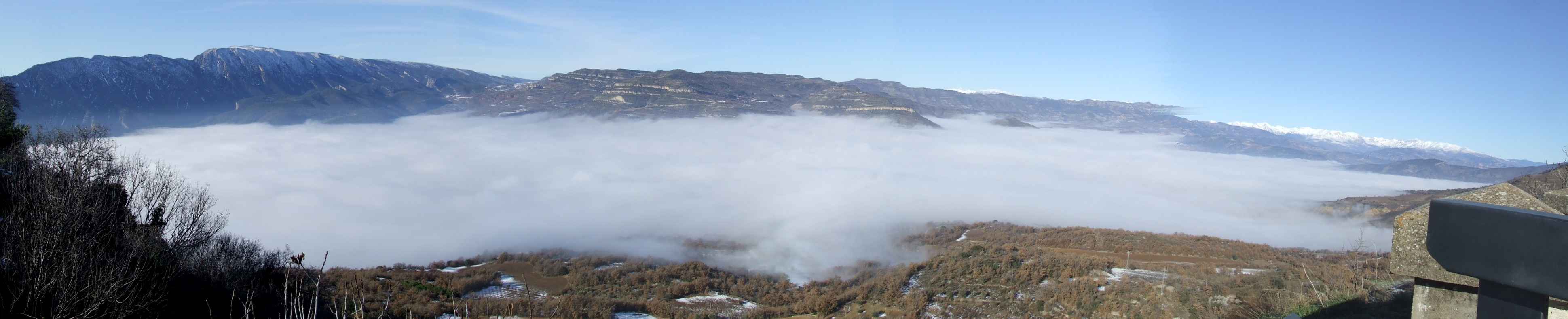 El Pantà dels Terradets un matí d'hivern, des de Llimiana (Castell de Mur i Llimiana, Pallars Jussà)